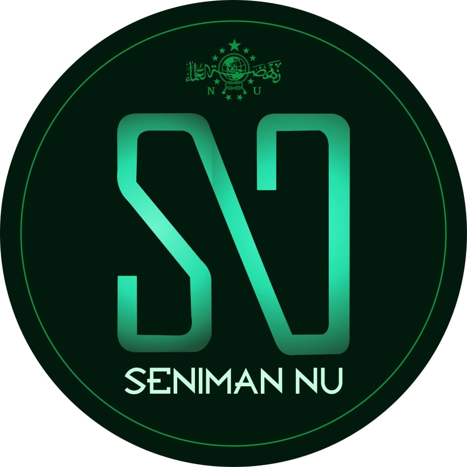 logo komunitas seniman nu